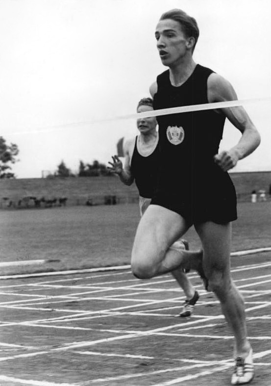 Zentralbild Kollektiv 2.8.1956 Die Sportwettkämpfe begannen in Leipzig. Am Donnerstag, dem 2.8.1956, wurden die Sportwettkämpfe im Rahmen des II. Deutschen Turn- und Sportfestes eröffnet. Im Bruno-Plache-Stadion wurde die Leichtathletik mit dem Olympischen Programm eröffnet. UBz: Im 100 m Vorlauf der Männer siegte der DDR-Meister Manfred Steinbach (Wissenschaft Halle) ganz überlegen. Steinbach passiert das Ziel.